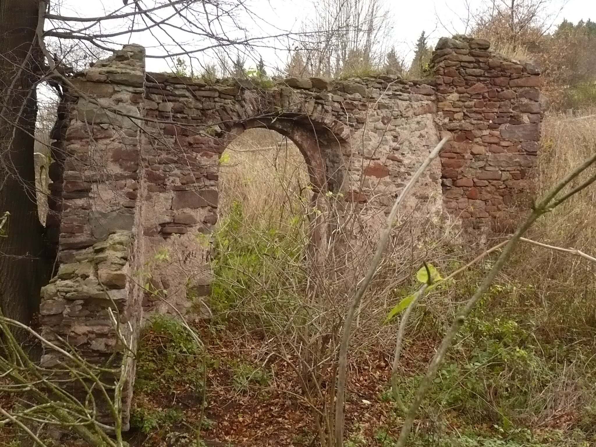 Ruina przy Dworze Dolnym